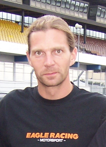 Janne Ahonen am Hockenheimring am 14. August 2010